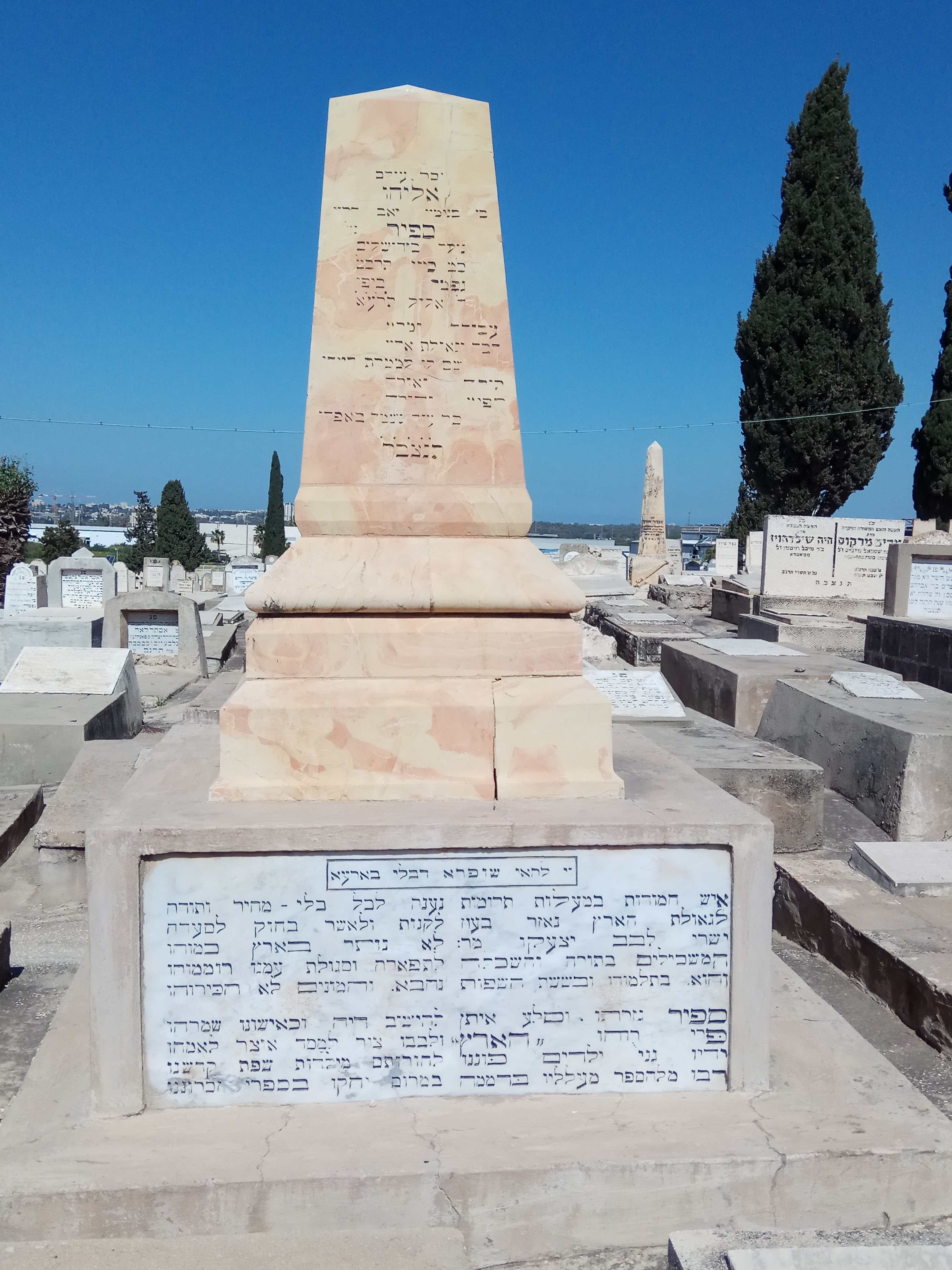 מצבת אליהו ספיר בבית הקברות סגולה בפתח תקווה